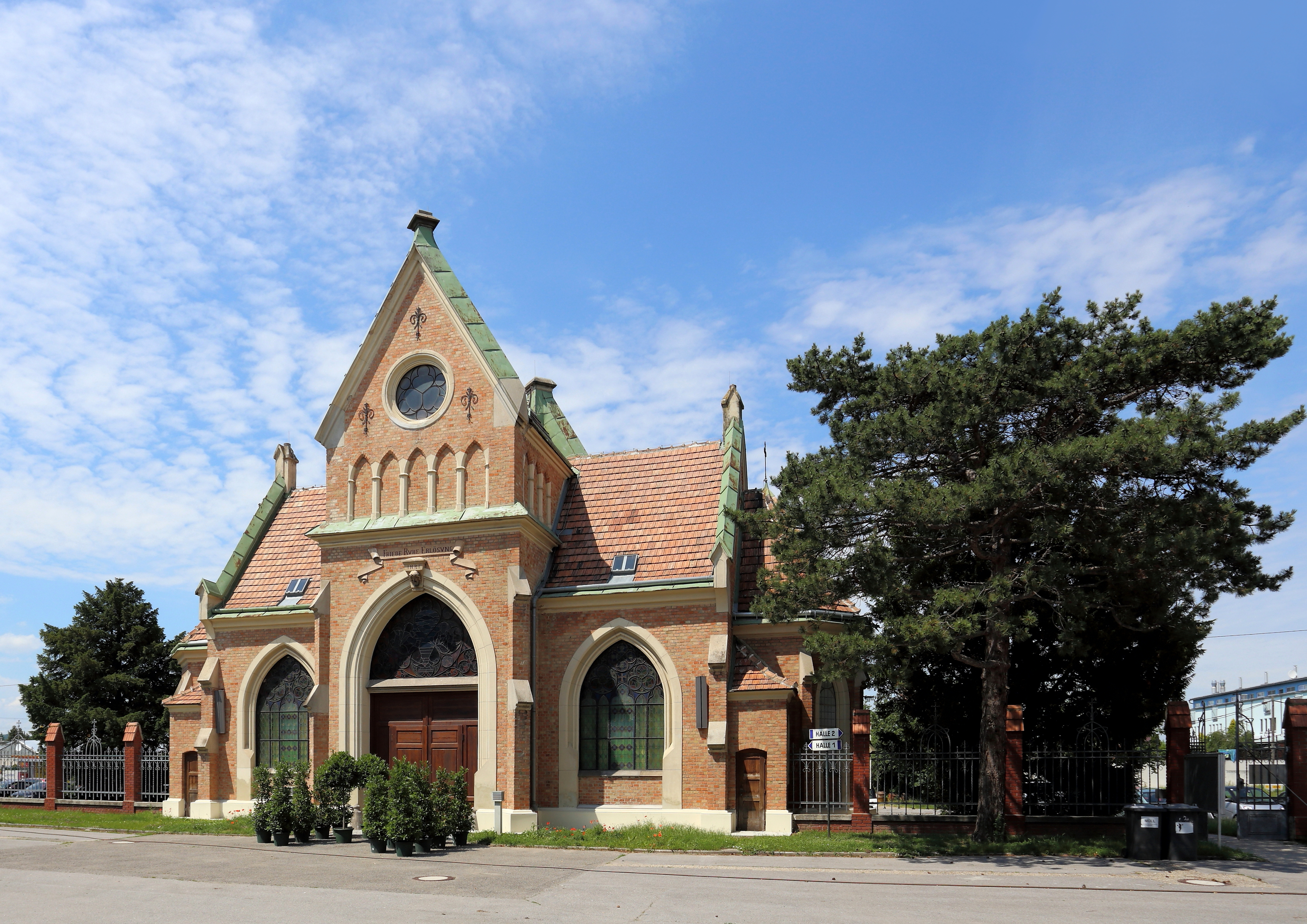 Aufbahrungshalle des Stammersdorfer Zentralfriedhofes in Wien. Der neue Friedhof wurde ab 1902 nach den Plänen des Ingenieurs Oskar Mratschek und Baumeisters Alois Frömmel errichtet und am 27. Mai 1903 durch Dechant Ludwig Hüttner von Pillichsdorf geweiht.